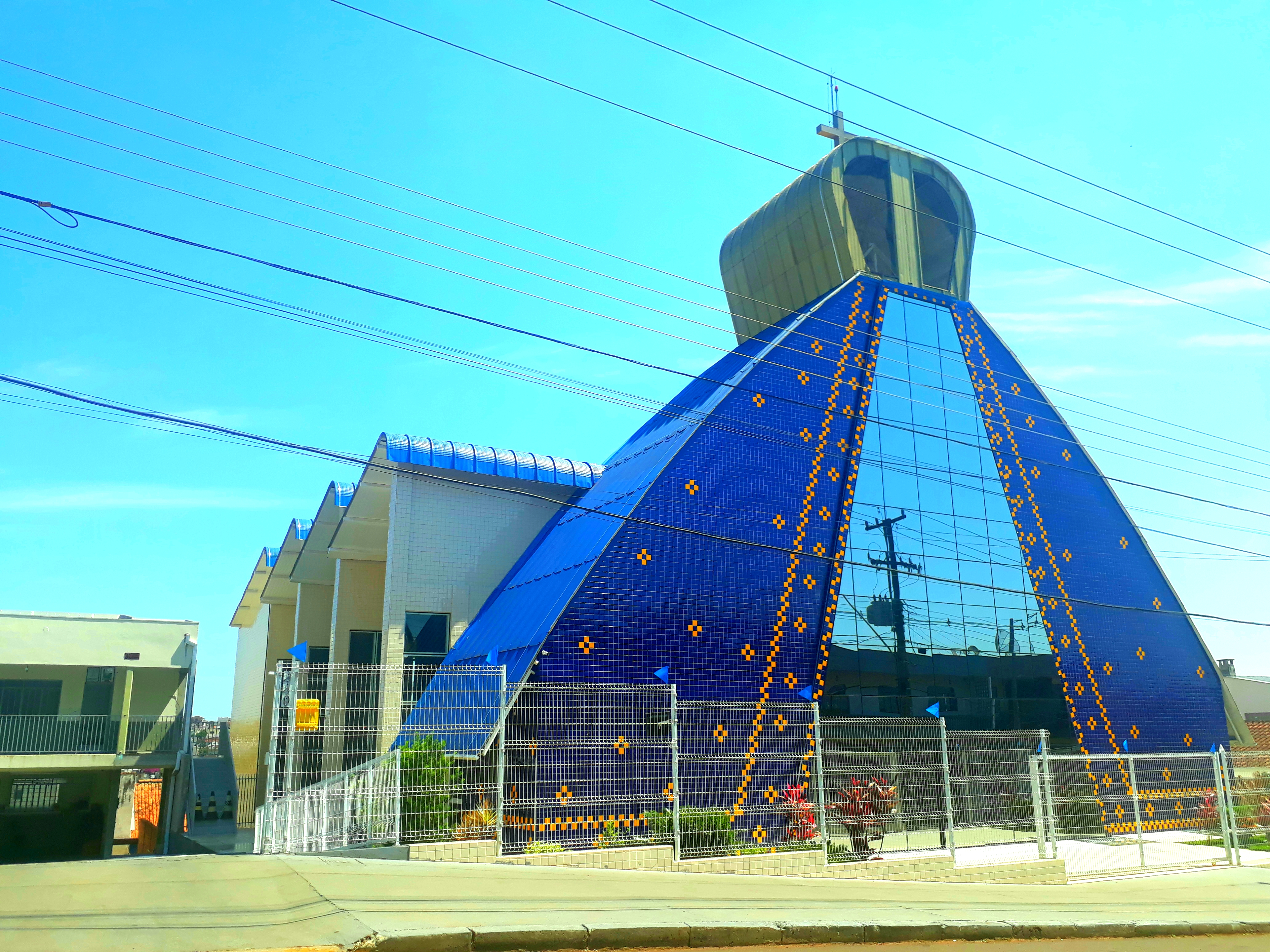 Vista da igreja da Comunidade católica Nossa Senhora Aparecida, no bairro Socomim, em Telêmaco Borba, no Paraná.